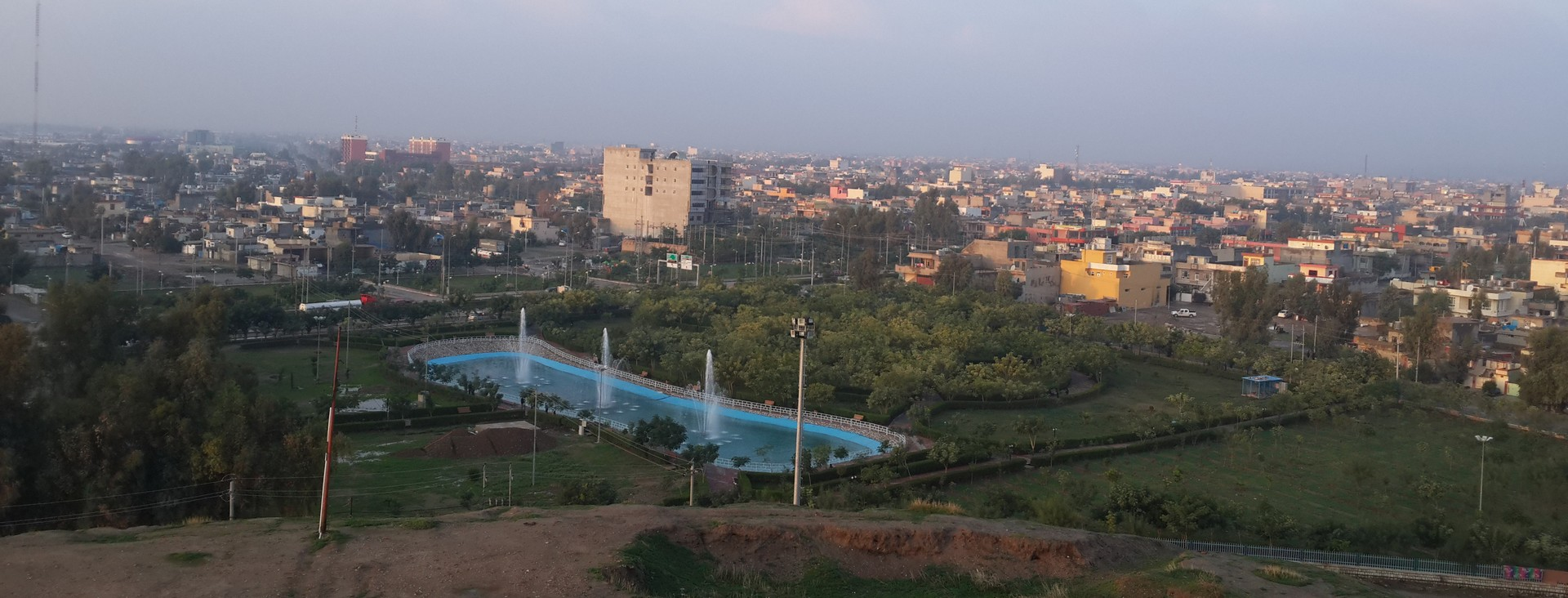 Kurdî: دیمەنی شاری کەلار و پارکی شێروانە لەسەر قەڵای شێروانەوە